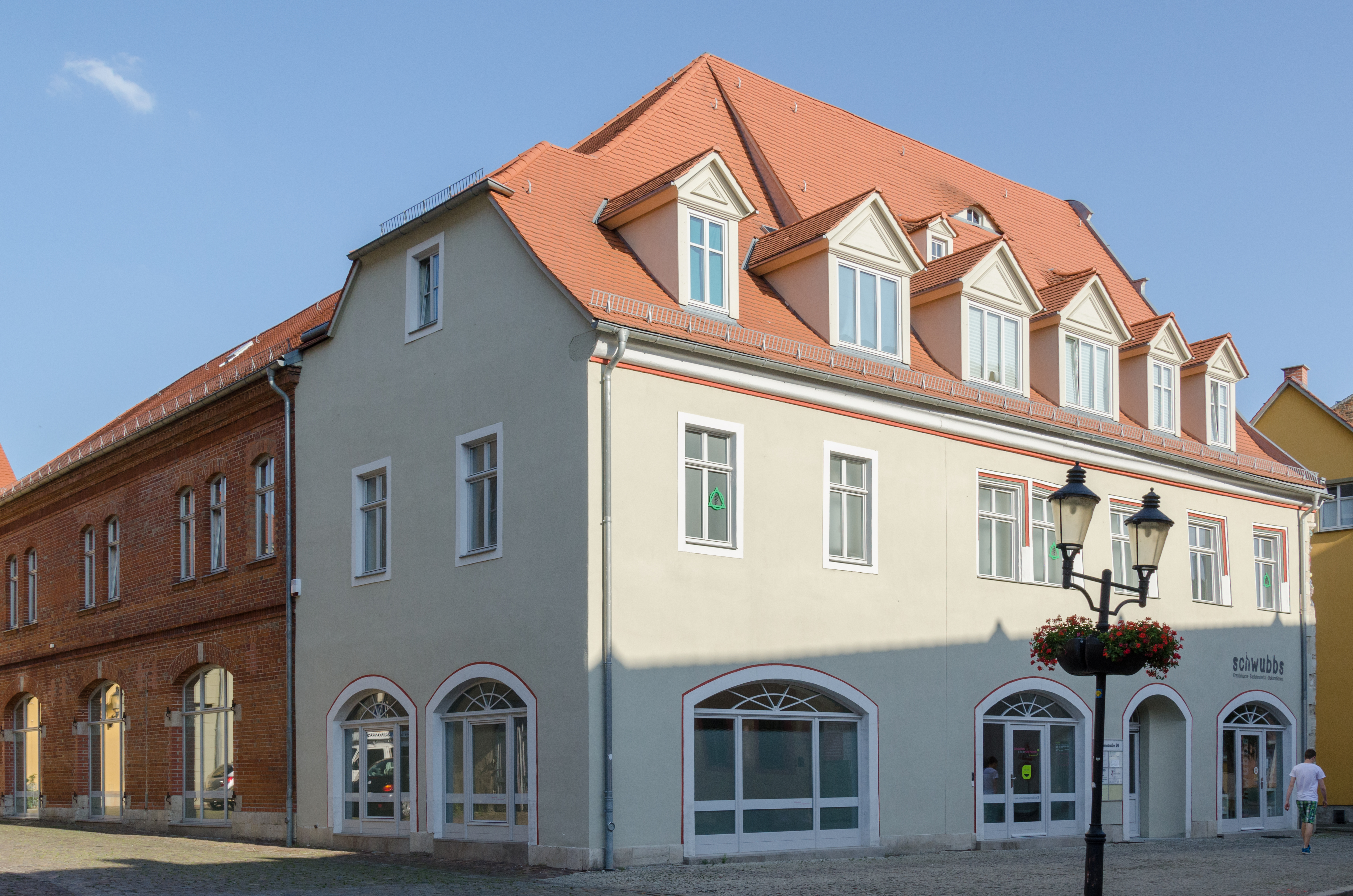 Naumburg, Marienstraße 20